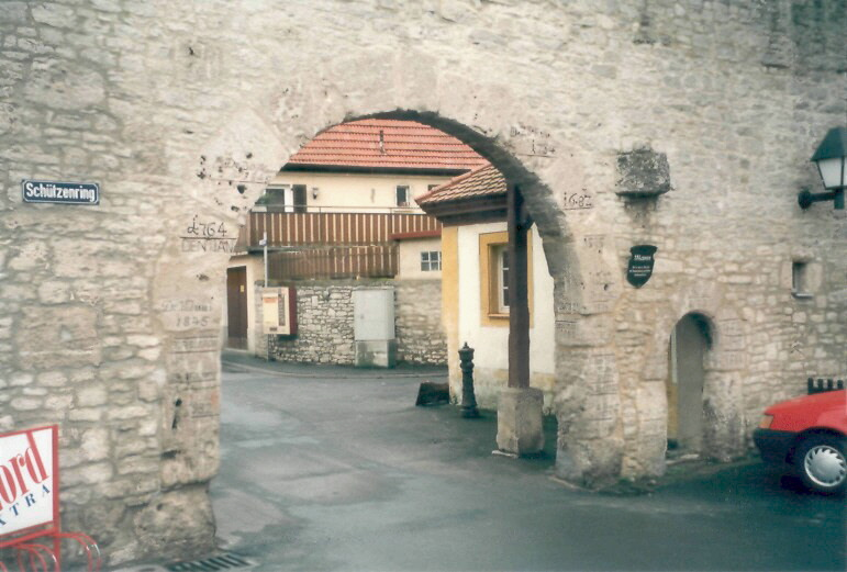 Maintor in Eibelstadt mit Hochwassermarkierungen